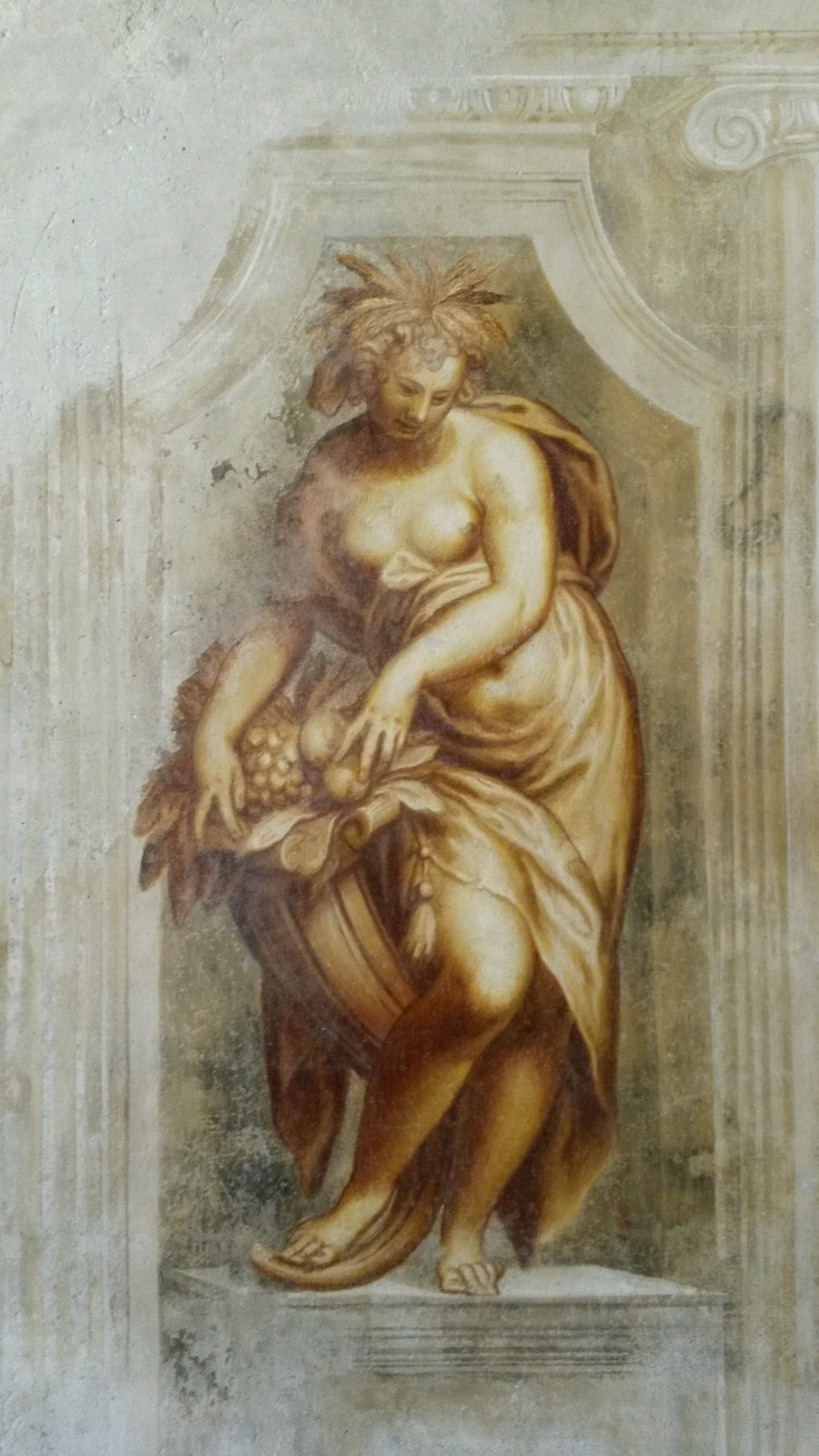 Paolo Farinati, Cerere, 1590 circa, affresco (restaurato nel 2016). Cerere, la dea della natura coltivata, è raffigurata con la cornucopia colma di frutti. Sulla parete di fronte è dipinta Diana, la dea della natura selvatica